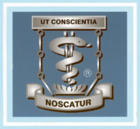 Logo de la Sophrologie Caycédienne